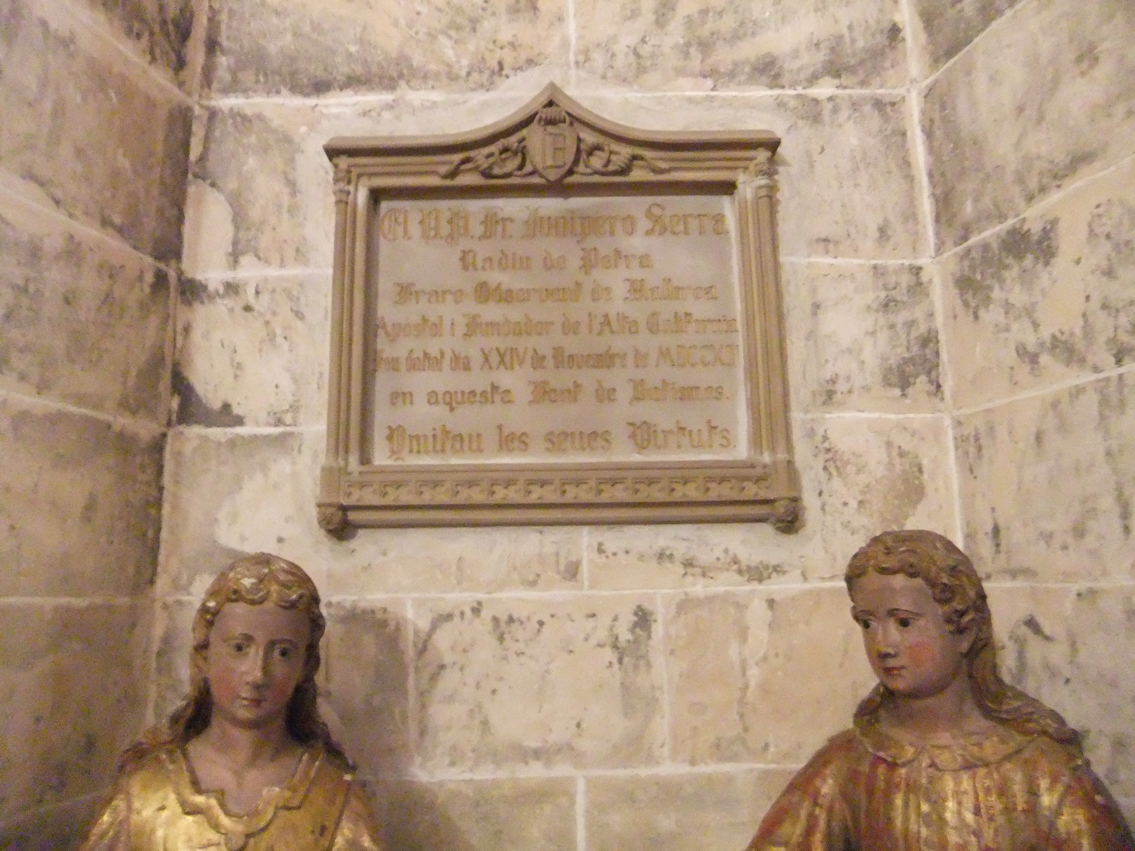 Dins de l'església parroquial de Petra.